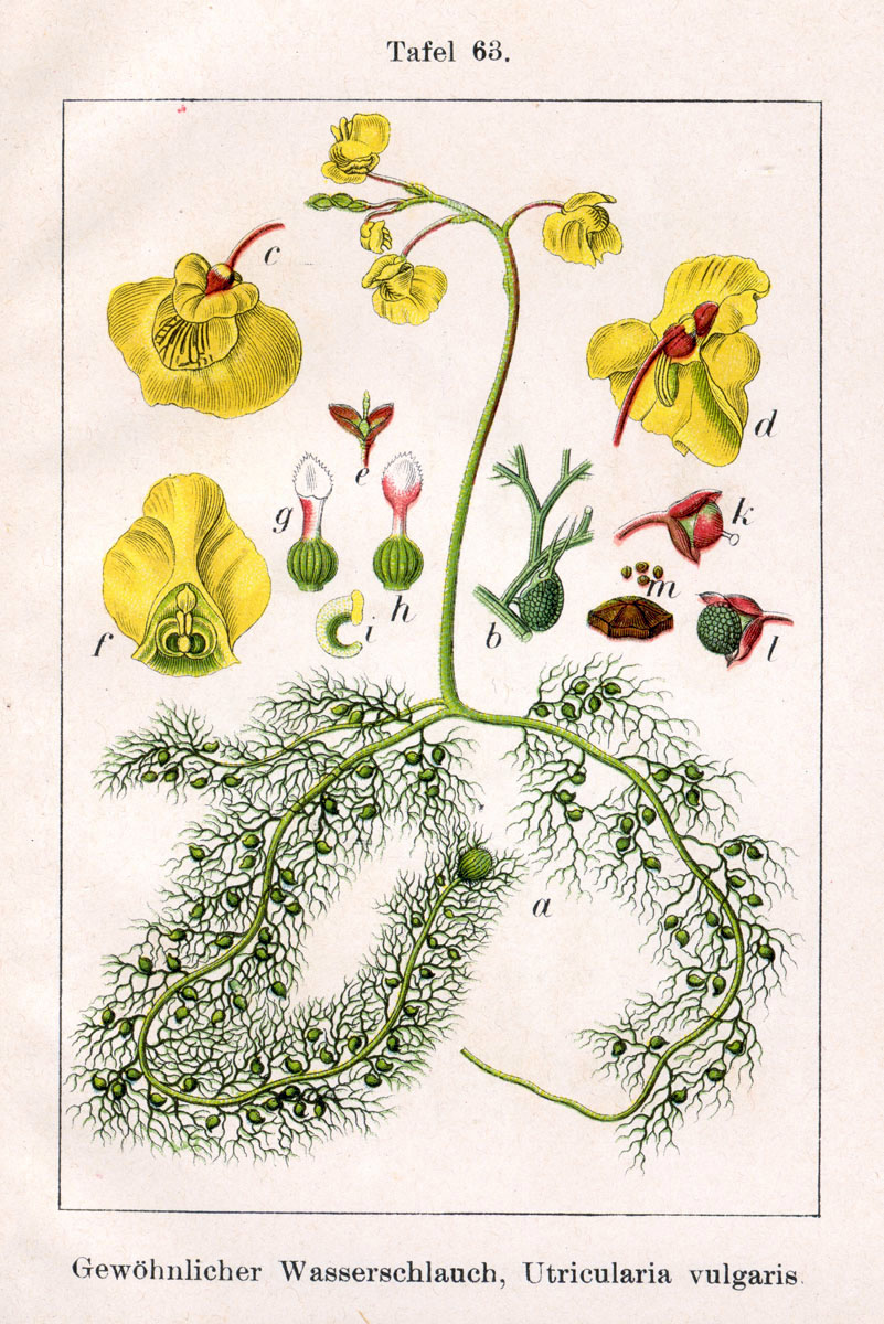 Utricularia vulgaris L. Original Description Gewöhnlicher Wasserschlauch, Utricularia vulgaris